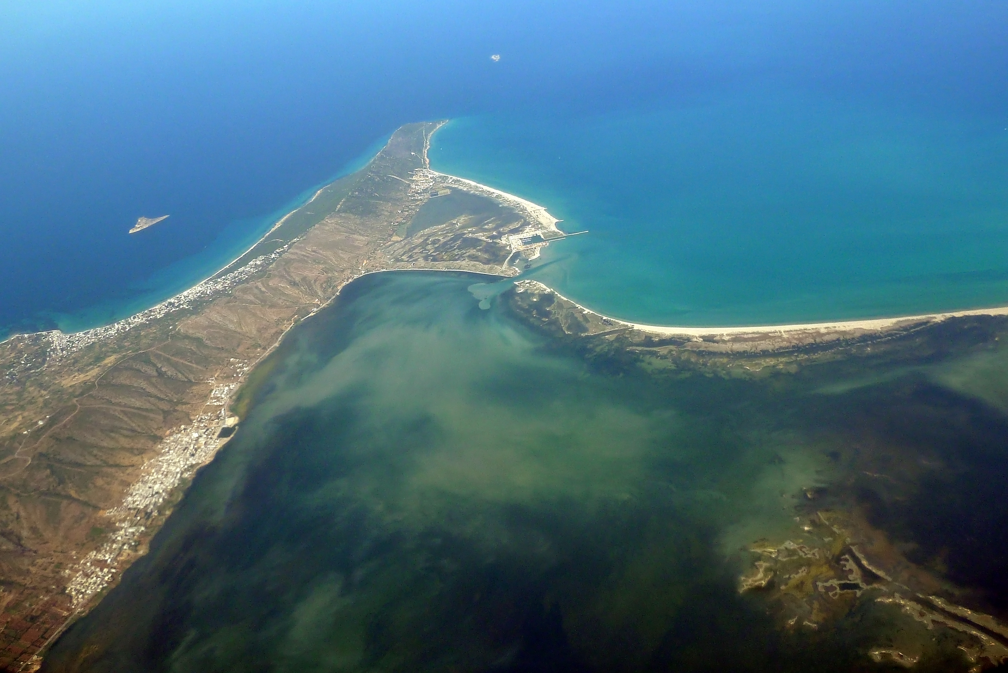 Vue aérienne de la région de Ghar El Melh. On aperçoit la lagune de Ghar El Mleh, le port de pêche et la plage de Sidi Ali El Mekki. Sur le flan de la montagne à droite le village de Ghar El Melh et à gauche Raf Raf El Hmari. Enfin on apercoit les iles Pilau et l'ile plane au bout du cap Farina.